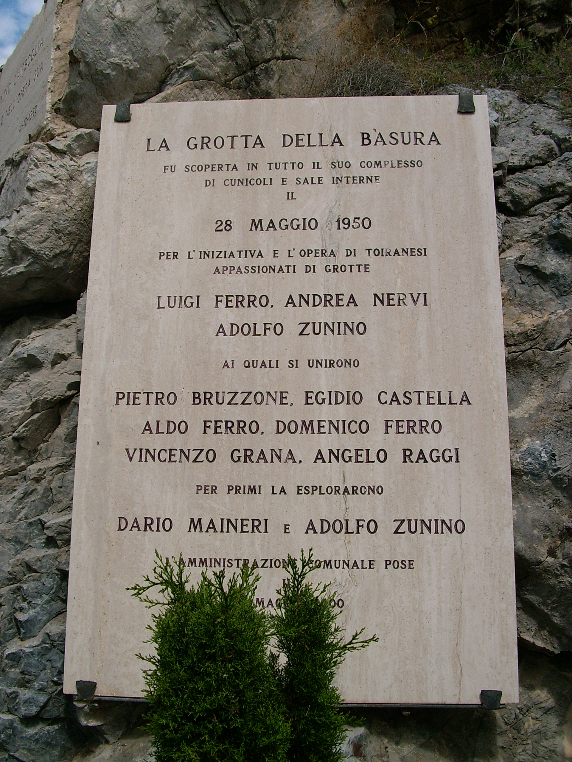 Grotta della Basura presso Toirano, Liguria, Italia